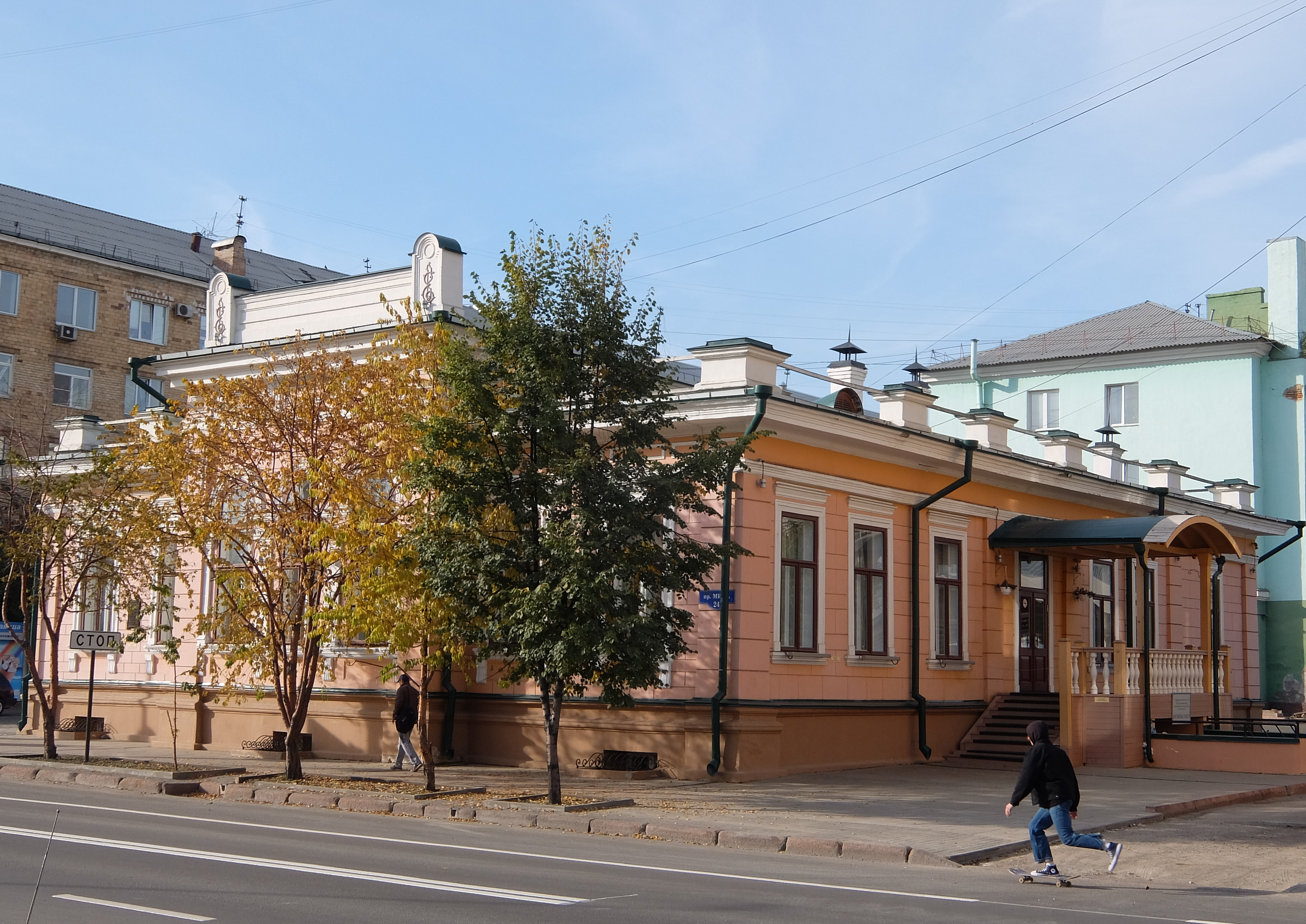 Контора Кузнецова в Красноярске, 1836 г., архитектор — А.Ф. Хейн.